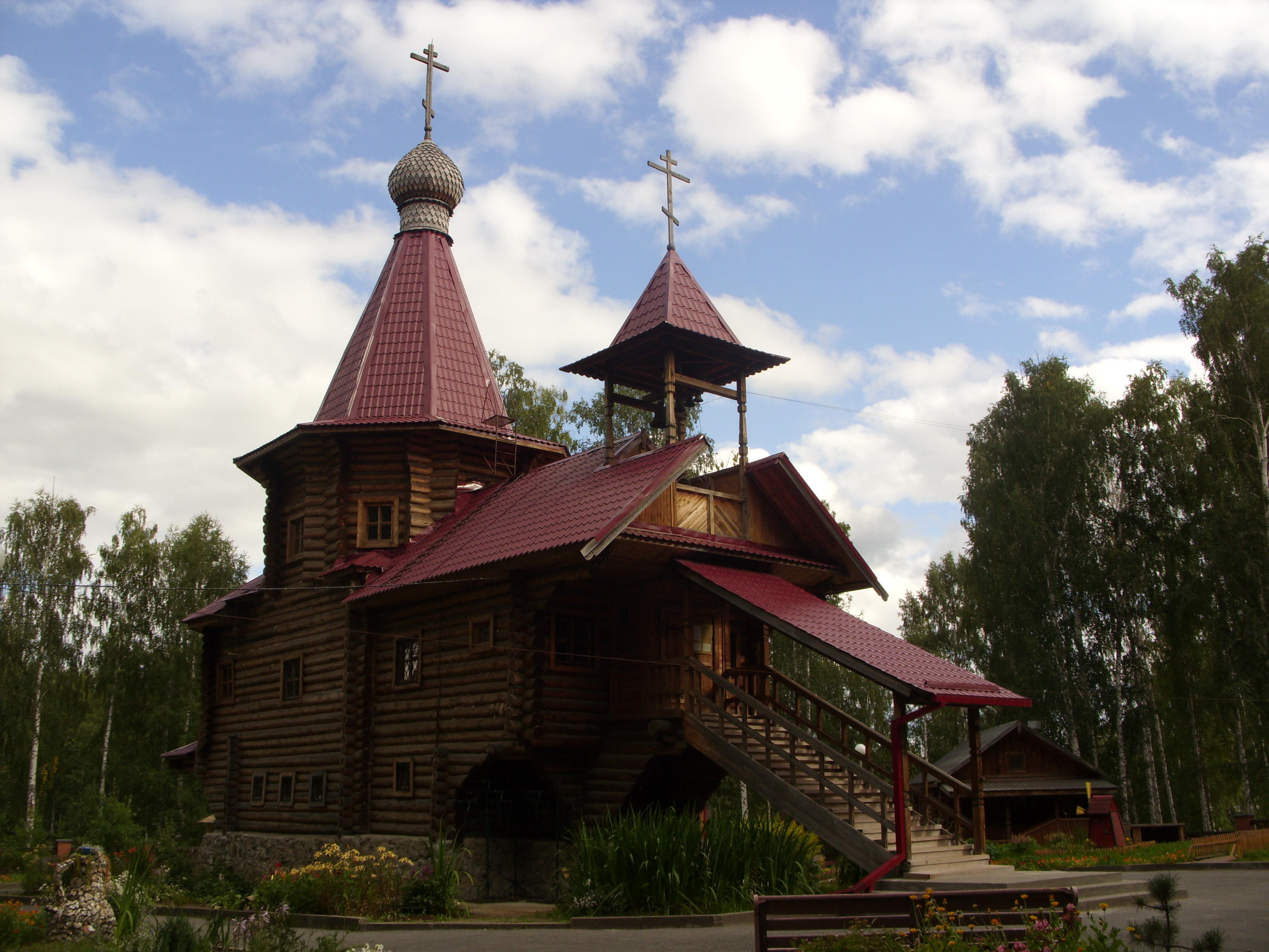 Церковь в Новоуральске. Вид с северо-востока